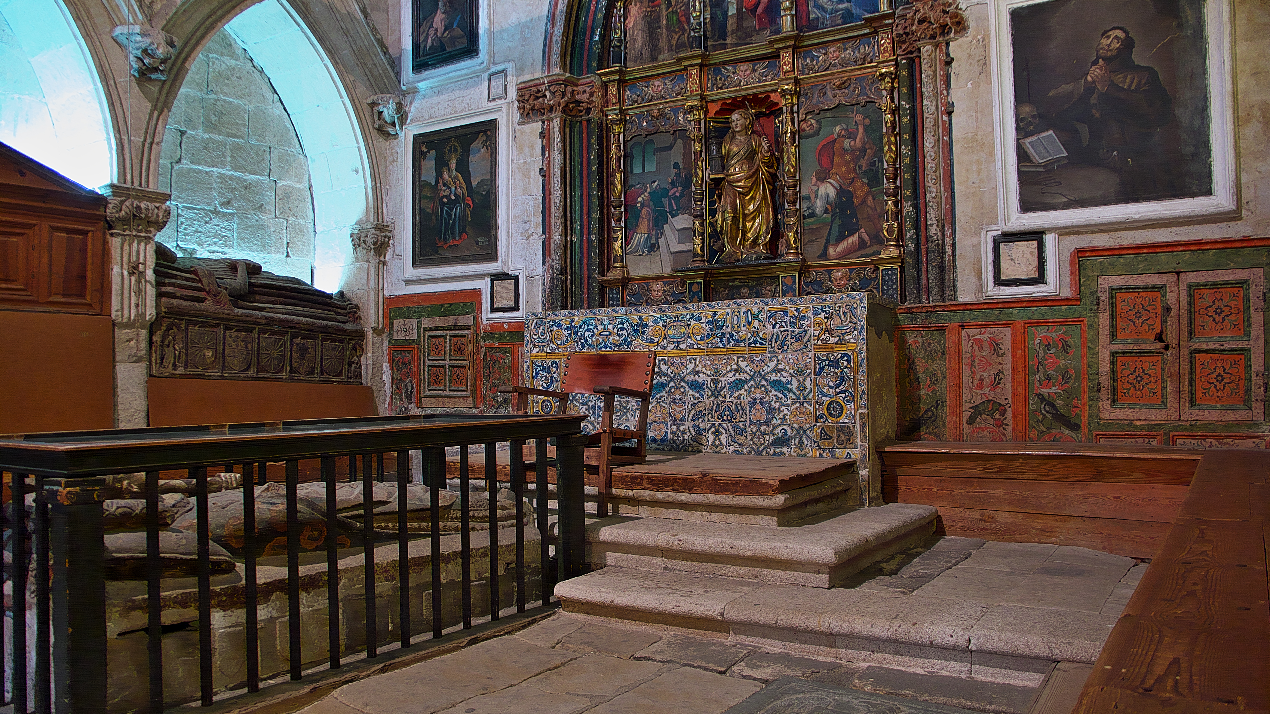 Claustro de la Catedral Vieja de Salamanca, capilla funeraria (1344) del obispo Juan Lucero (†1362)